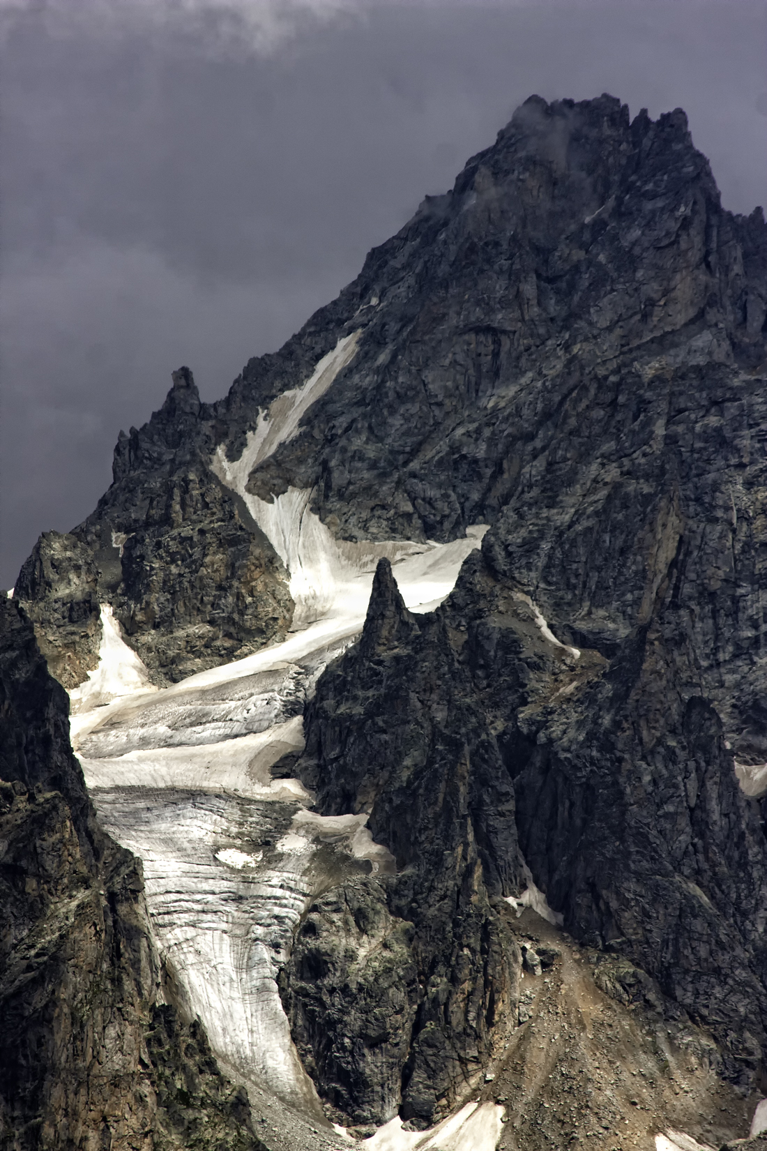 Glaciers in Svaneti